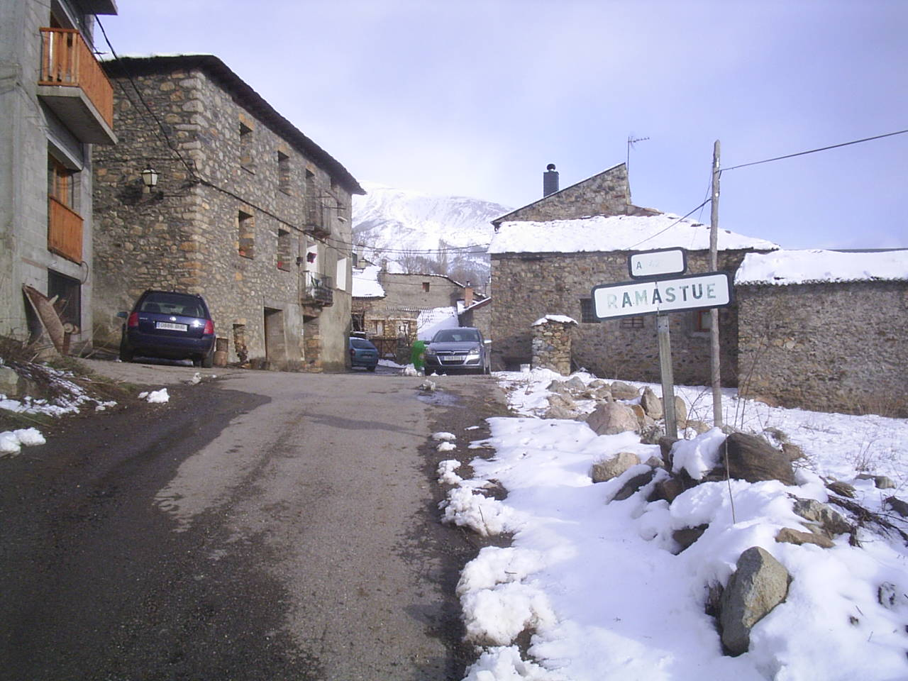 Entrada a Ramastué desde Eresué